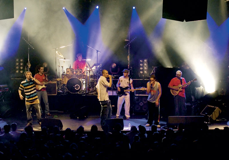 Datune en concert